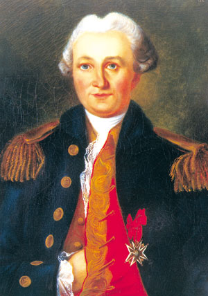 Portrait d'Yves Joseph de Kerguelen de Trémarec (1734–1797), officier de marine et explorateur français